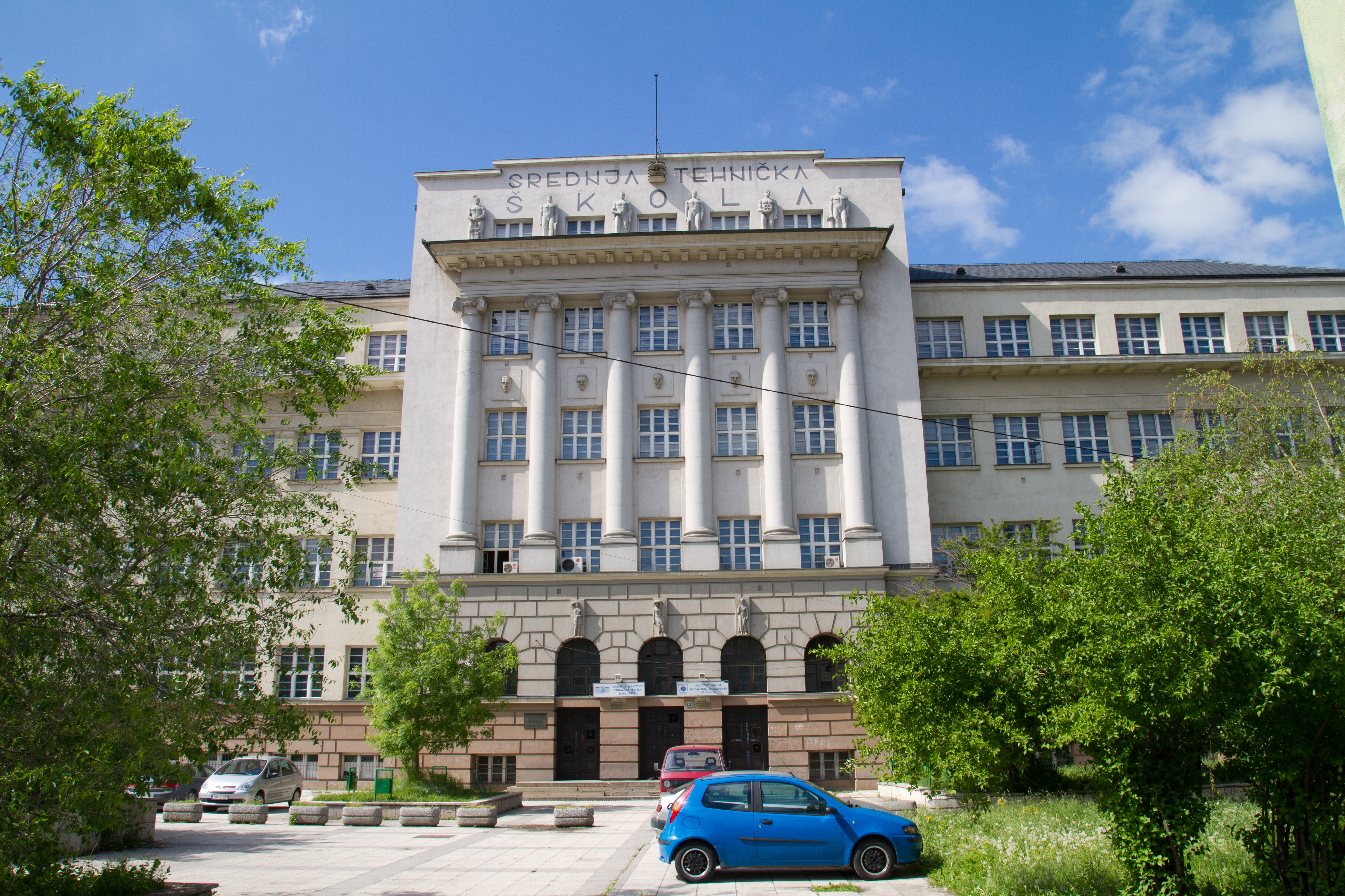 Srednja tehnička škola